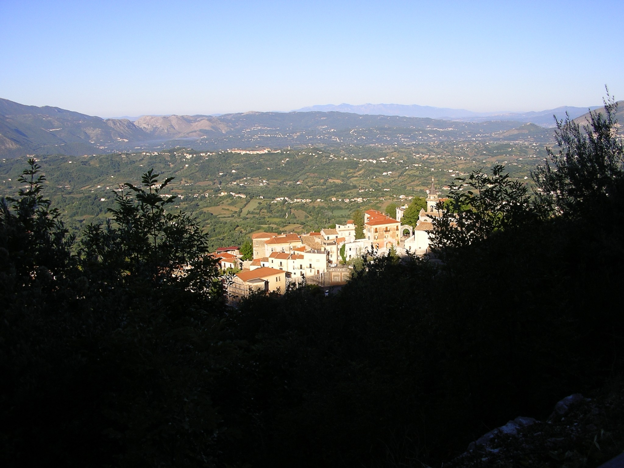 Panorama di Settefrati al mattino